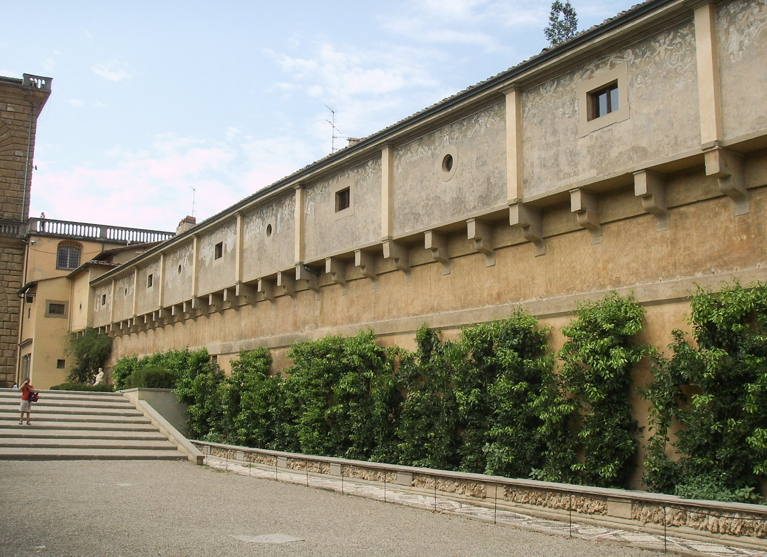 Boboli, corridoio vasariano